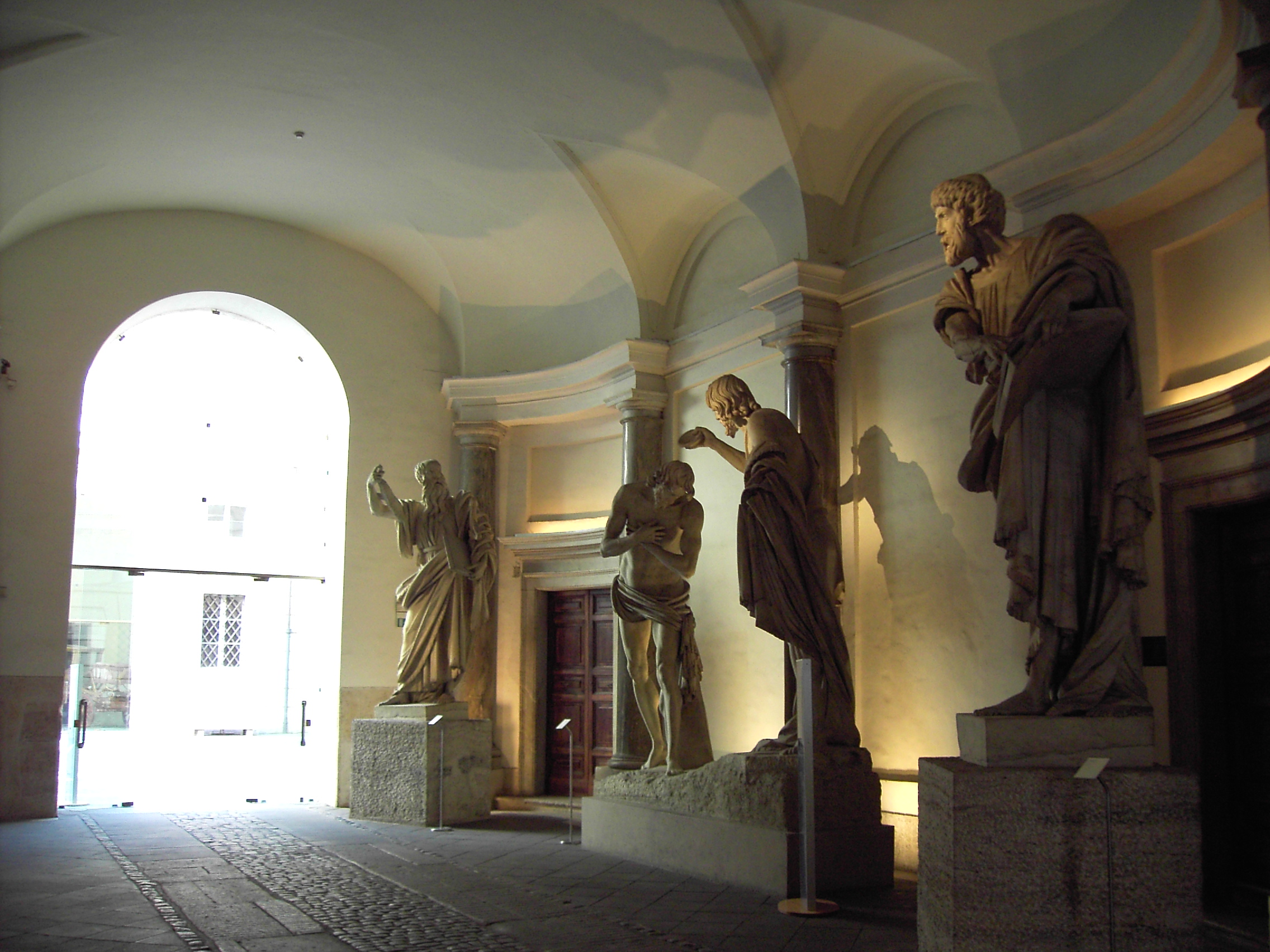 Roma, Palazzo Braschi - vestibolo al piano terreno